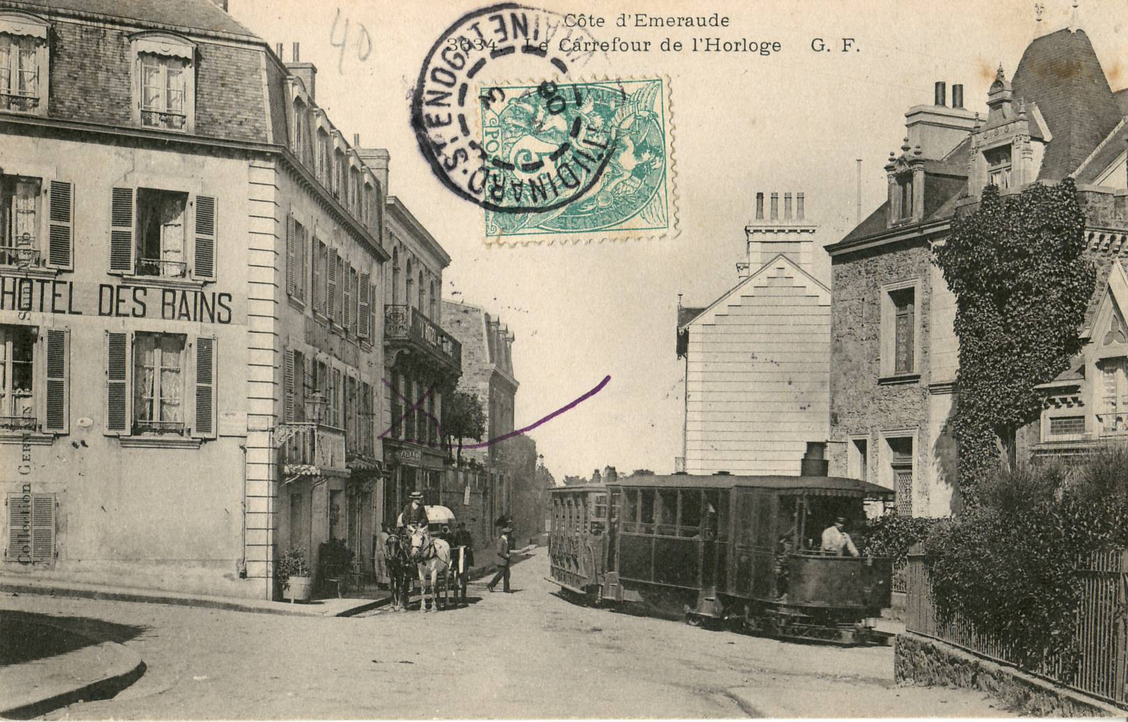 Carte postale ancienne éditée par GF, n°3634 : Côte d'émeraude : Carrefour de l'HorlogeDINARD - Vue du Tramway de Saint-Briac à Dinard